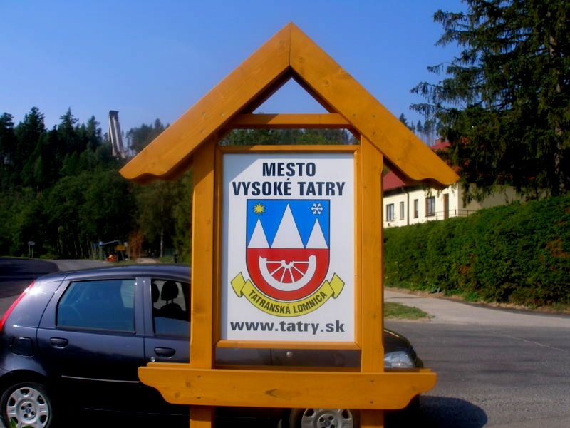 Tatranská osada Tatranská Lomnica